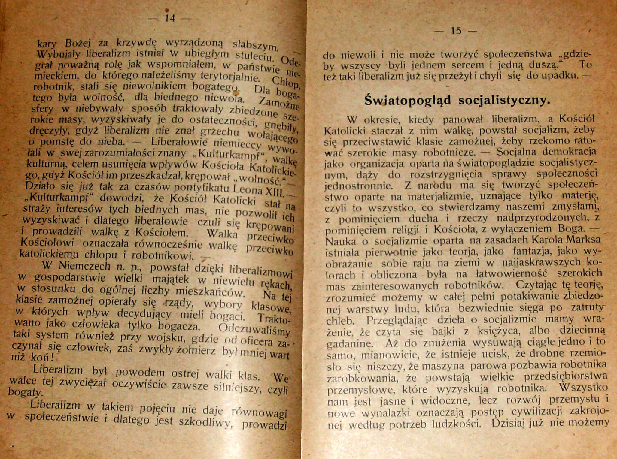 Stanisław Krzyżowski, Rozmyślania w czterdziestą rocznicę encykliki „Rerum novarum”, wydanej 15 maja 1891 r. przez papieża Leona XIII, Pszczyna 1931